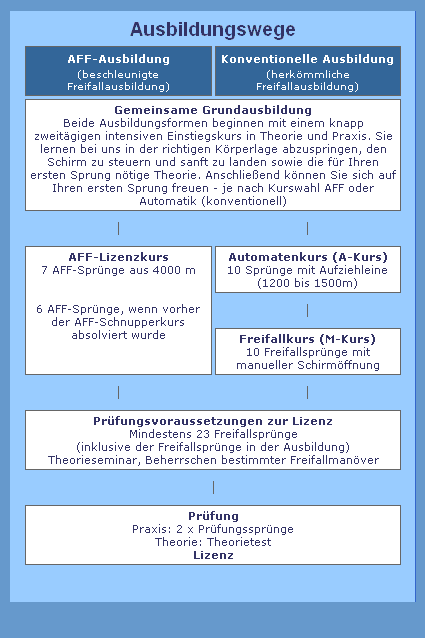 Bildliche Darstellung der Ausbildungsmöglichkeiten / Ausbildungswege zum Fallschirmspringer